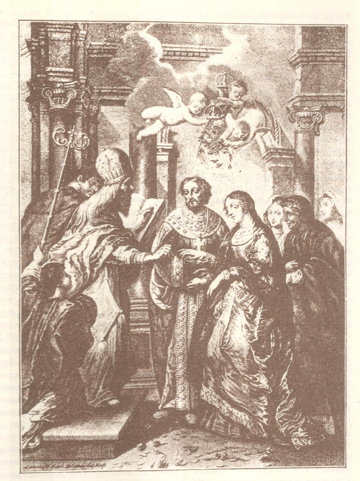 Свадьба Алексея Михайловича и Наталии Нарышкиной